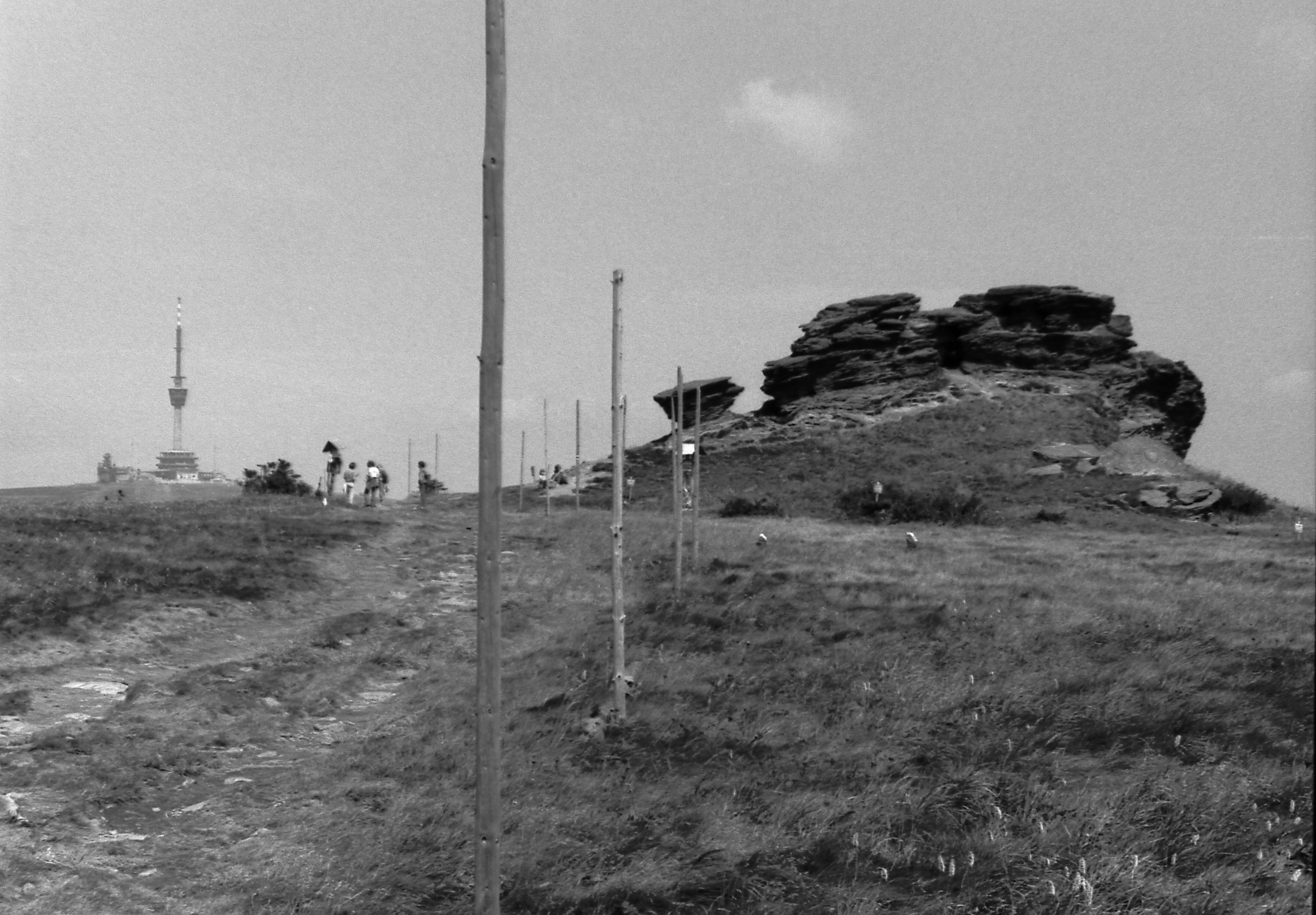 Pohled na Petrovy kameny a Praděd. Počátek osmdesátých let 20. století.